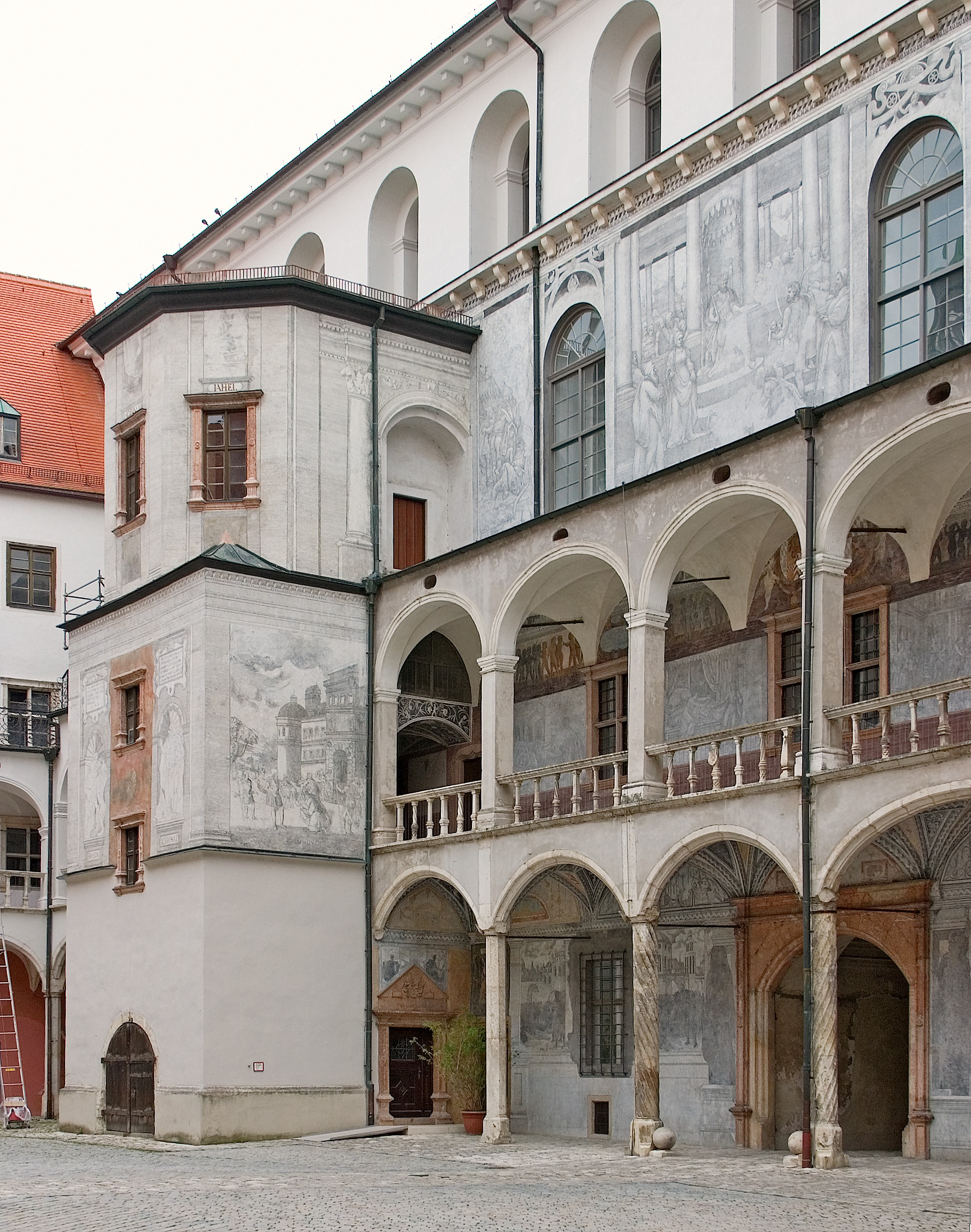 Neuburg an der Donau, Schloss, Ansicht der Hoffassade des ab 1537 errichteten Saalbaus